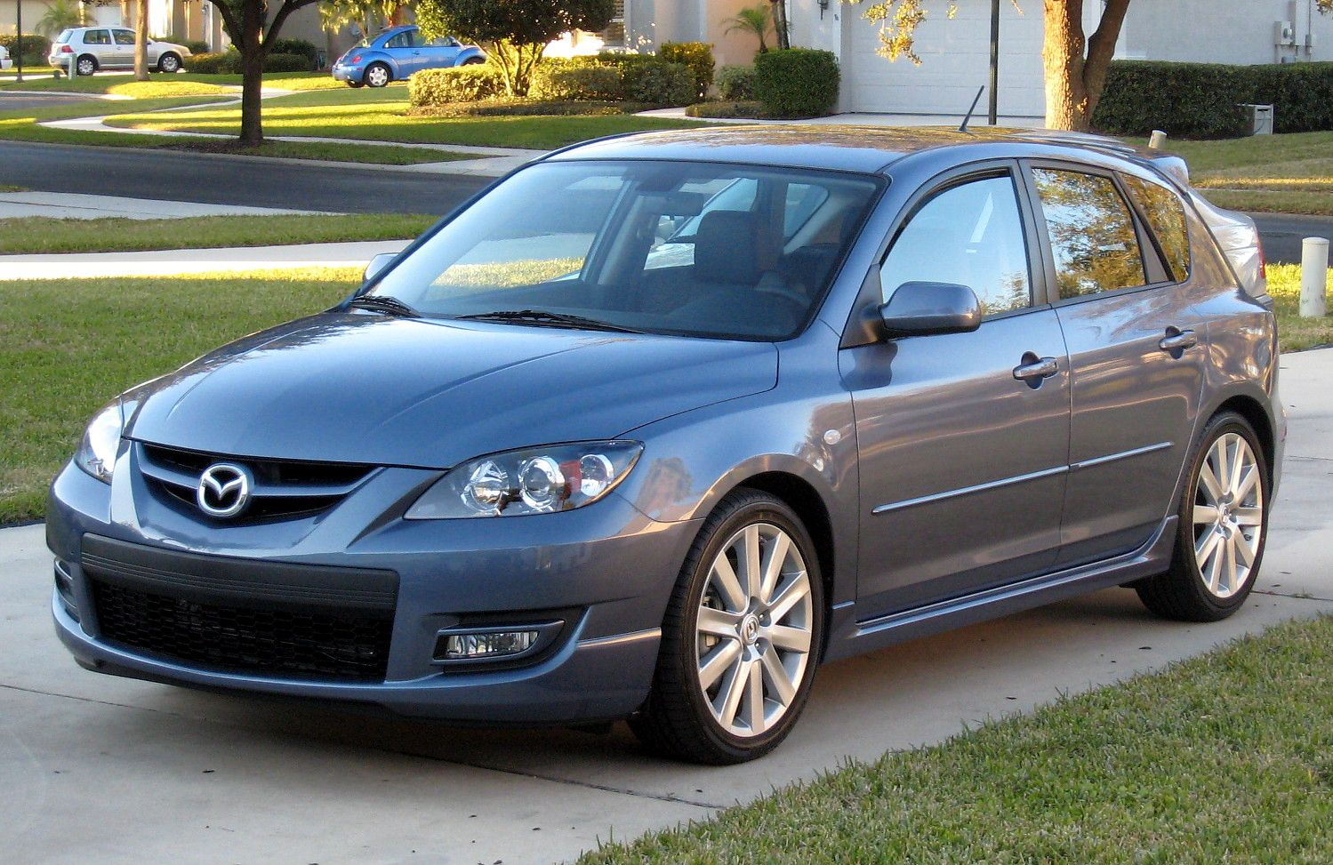 Mazda3 MPS.